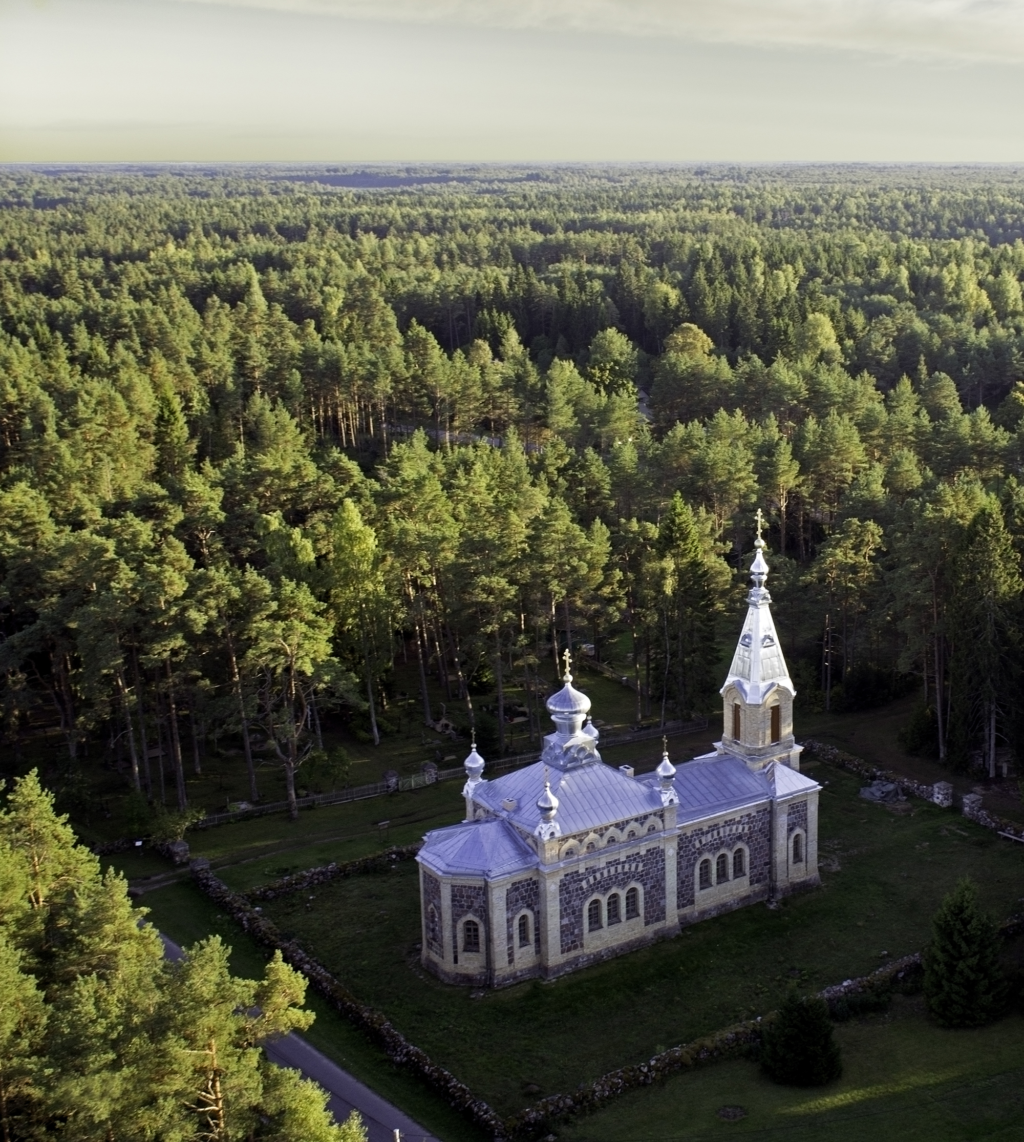 Kuriste õigeusu kirik. Vaade ülevalt. 2013